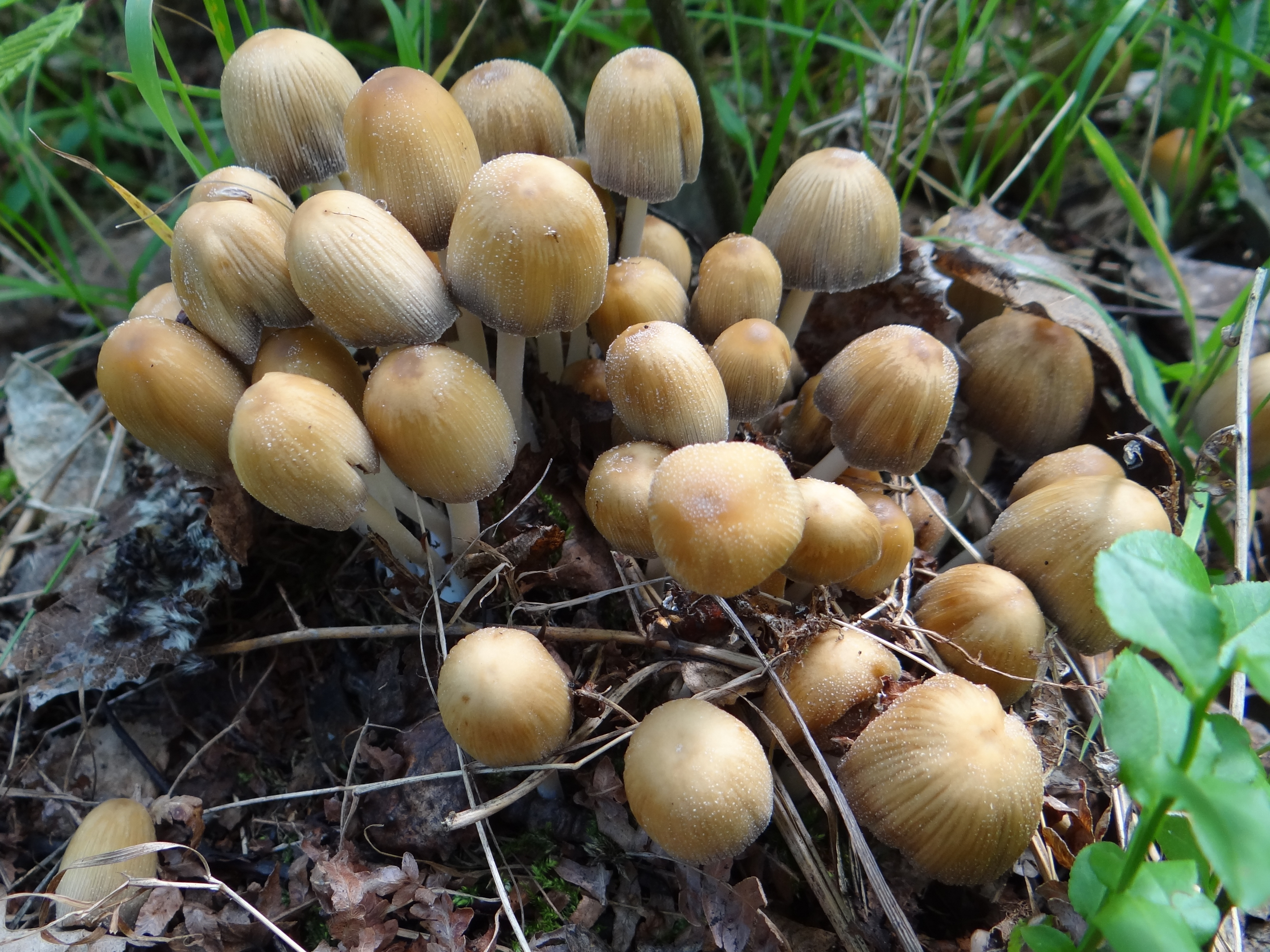 Coprinellus micaceus